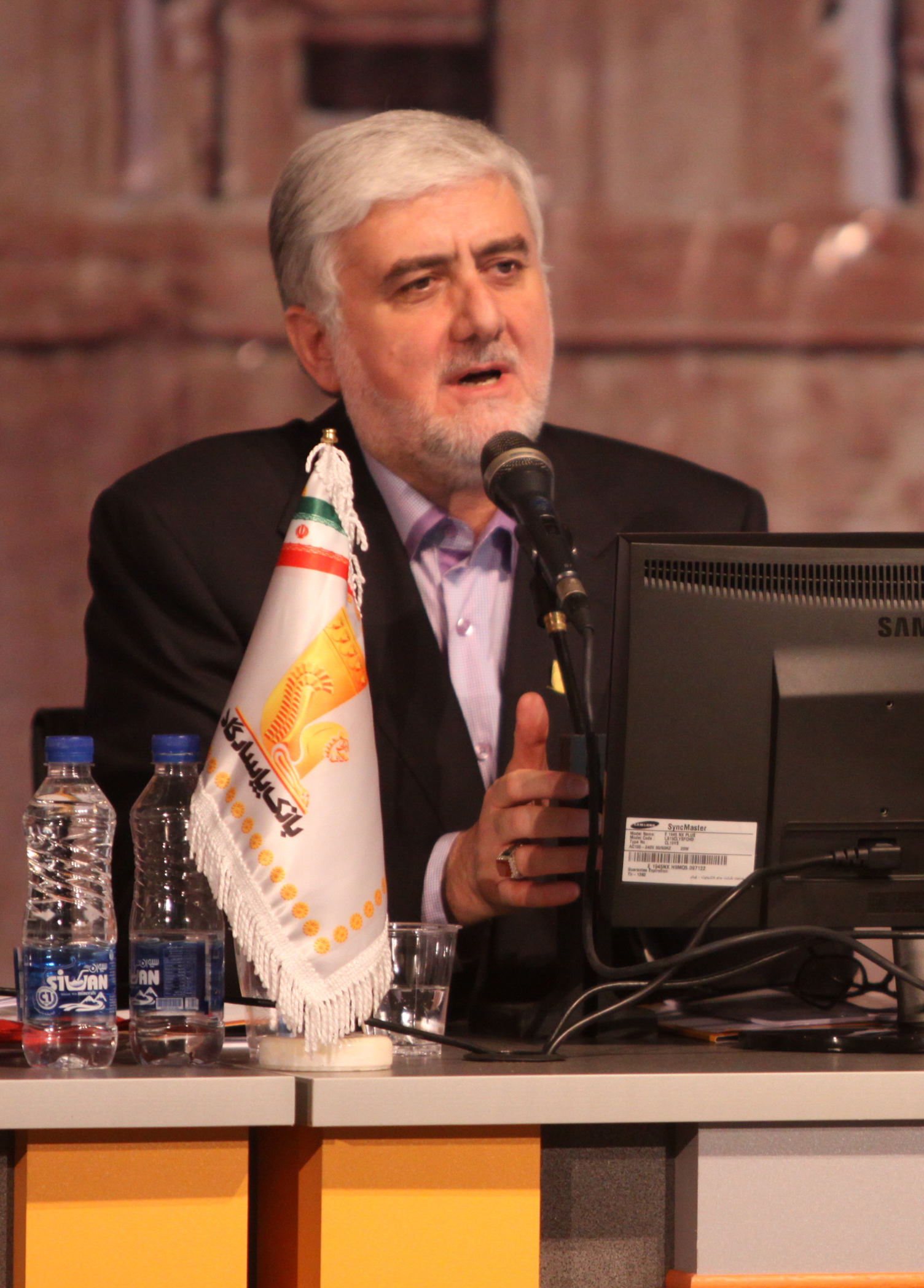 دکتر مجید قاسمی در مجمع عمومی عادی بانک پاسارگاد در سال 89